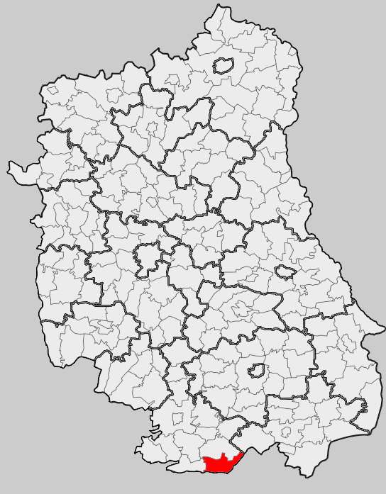 Map of gmina Obsza, Biłgoraj county, Lublin voivodship Mapa gminy Obsza, powiat biłgorajski, województwo lubelskie